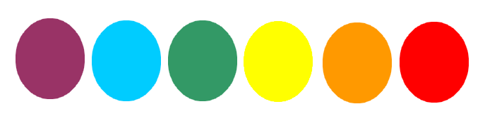 Dessin des Gemmes de l'Infini selon leurs couleurs.